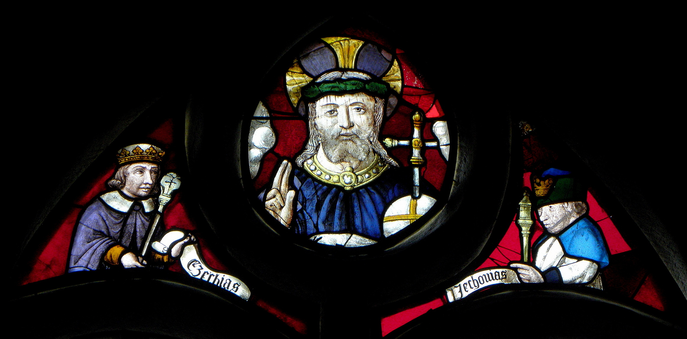 Baie 05 de la chapelle Notre-Dame de Kergoat en Quéménéven (29).